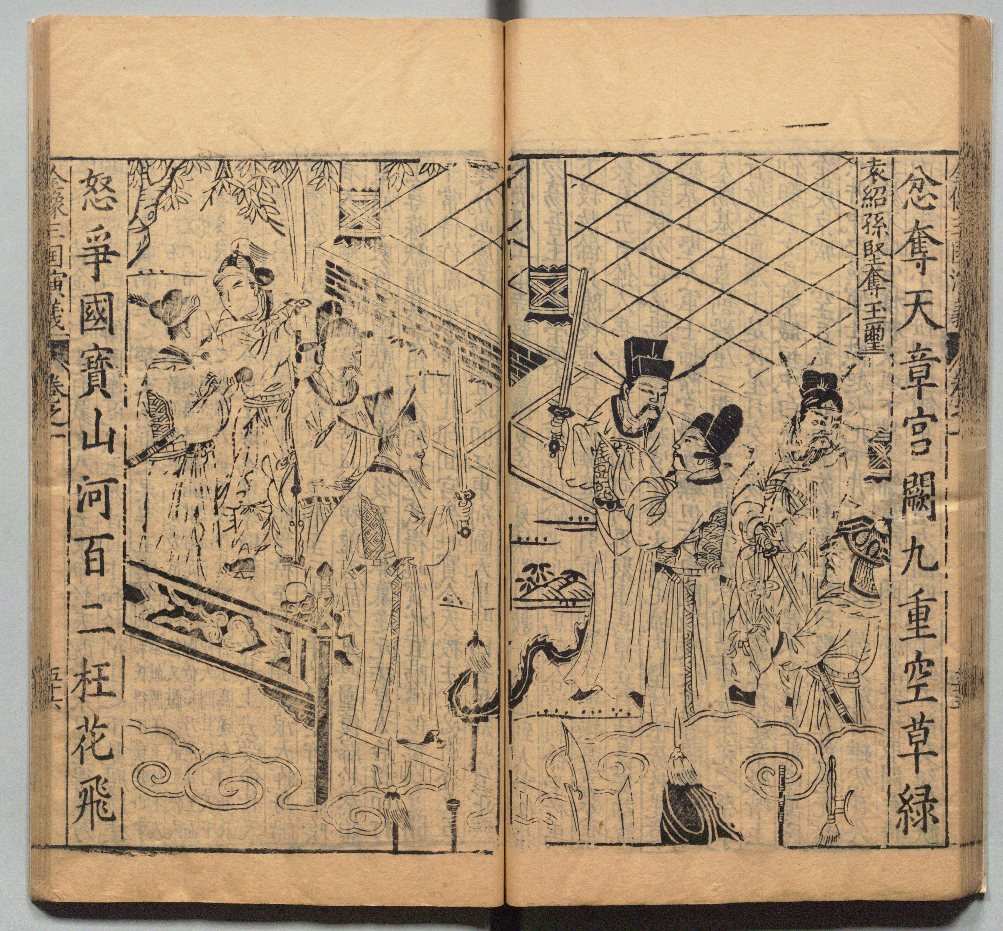 《新刊校正古本大字音释三国志通俗演义》 明万历十九年书林周曰校刊本